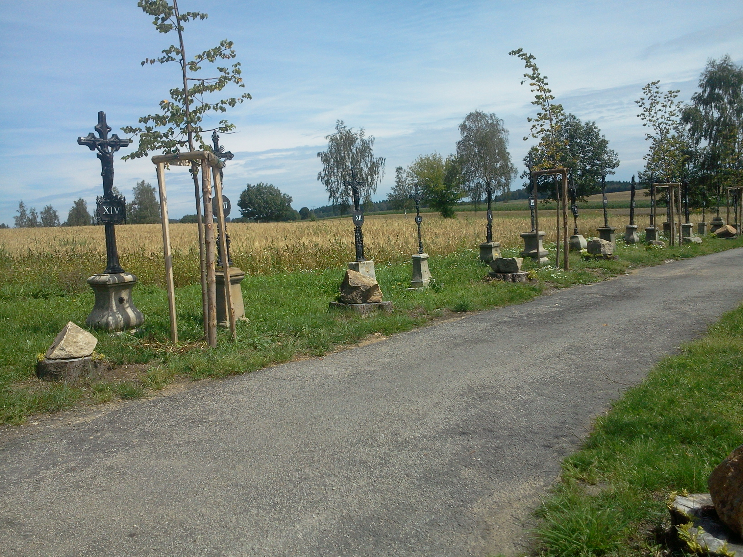 Křížová cesta u hřbitova v blízkosti obce Strmilov (Jihočeský kraj)